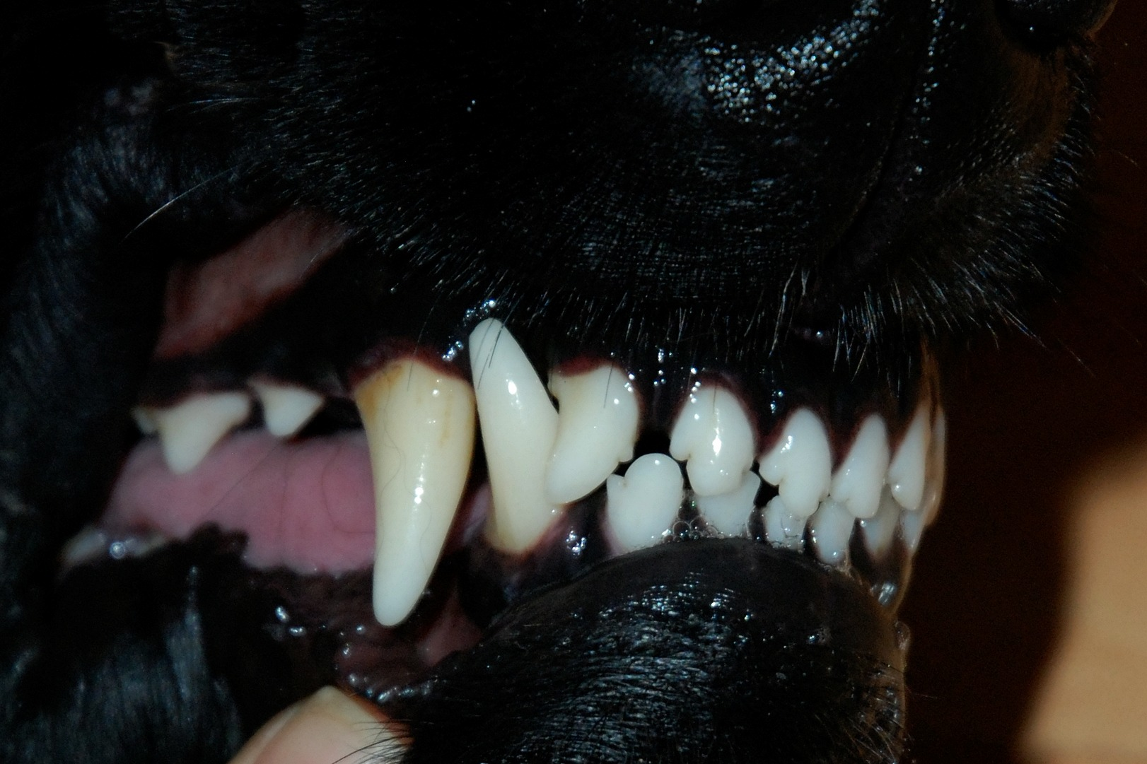 nůžkový skus mého psa